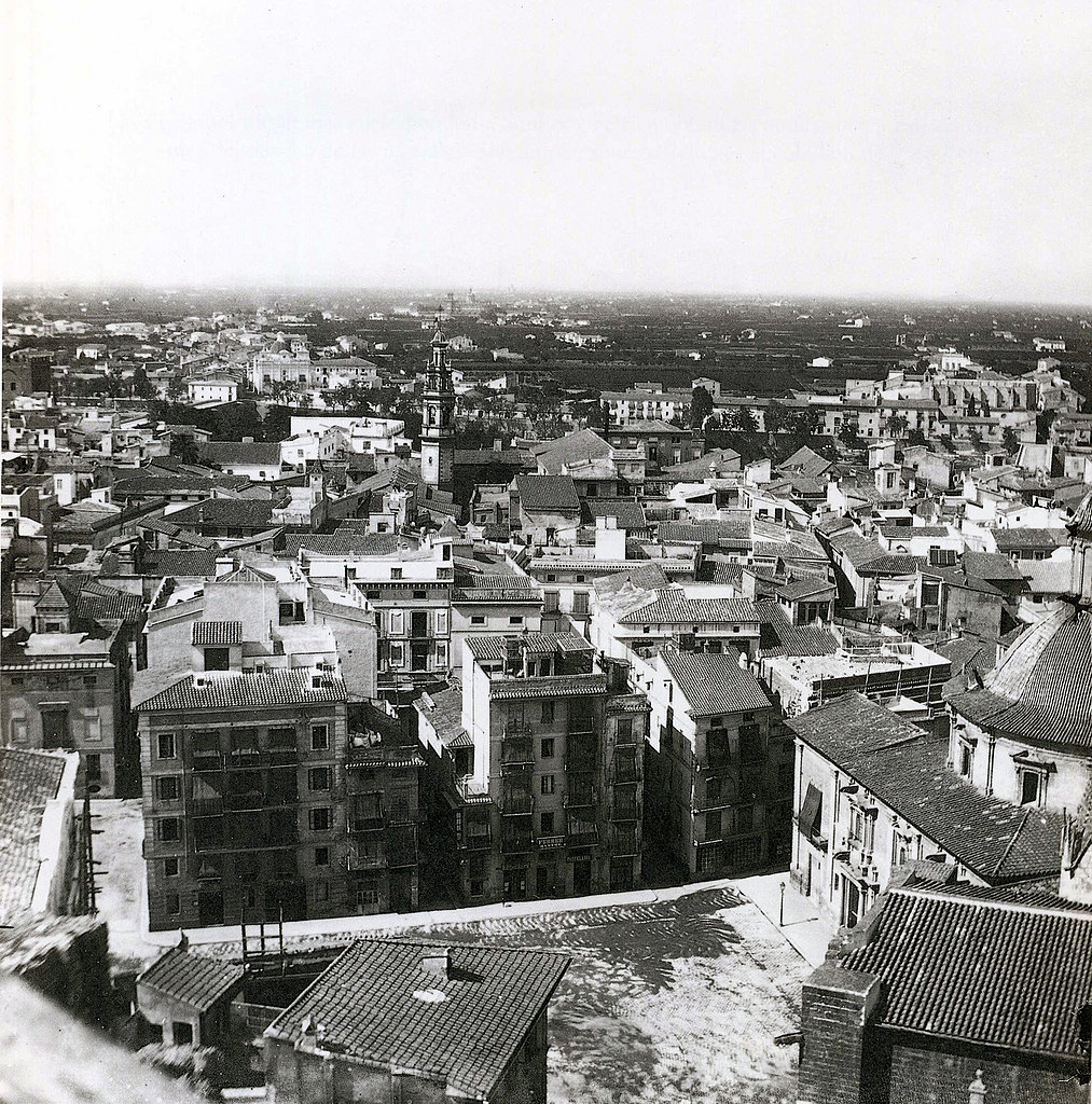 Foto, des del Micalet, de València en 1861; en primer pla la plaça de la Mare de Déu, i l'horta en la llunyania. Aut: Ferrier, Claude Marie (1811-1889) & Soulier, Charles (s. XIX-1876)